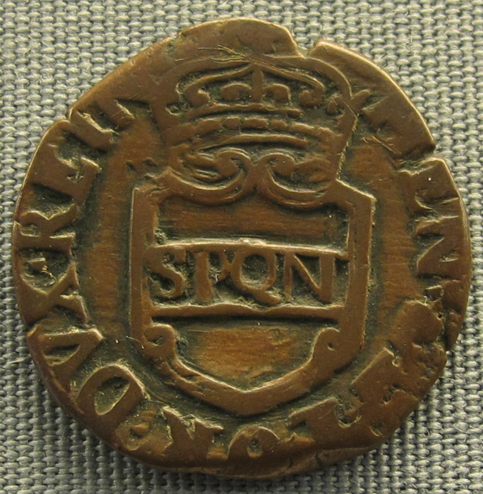 Napoli, repubblica, pubblica del 1648